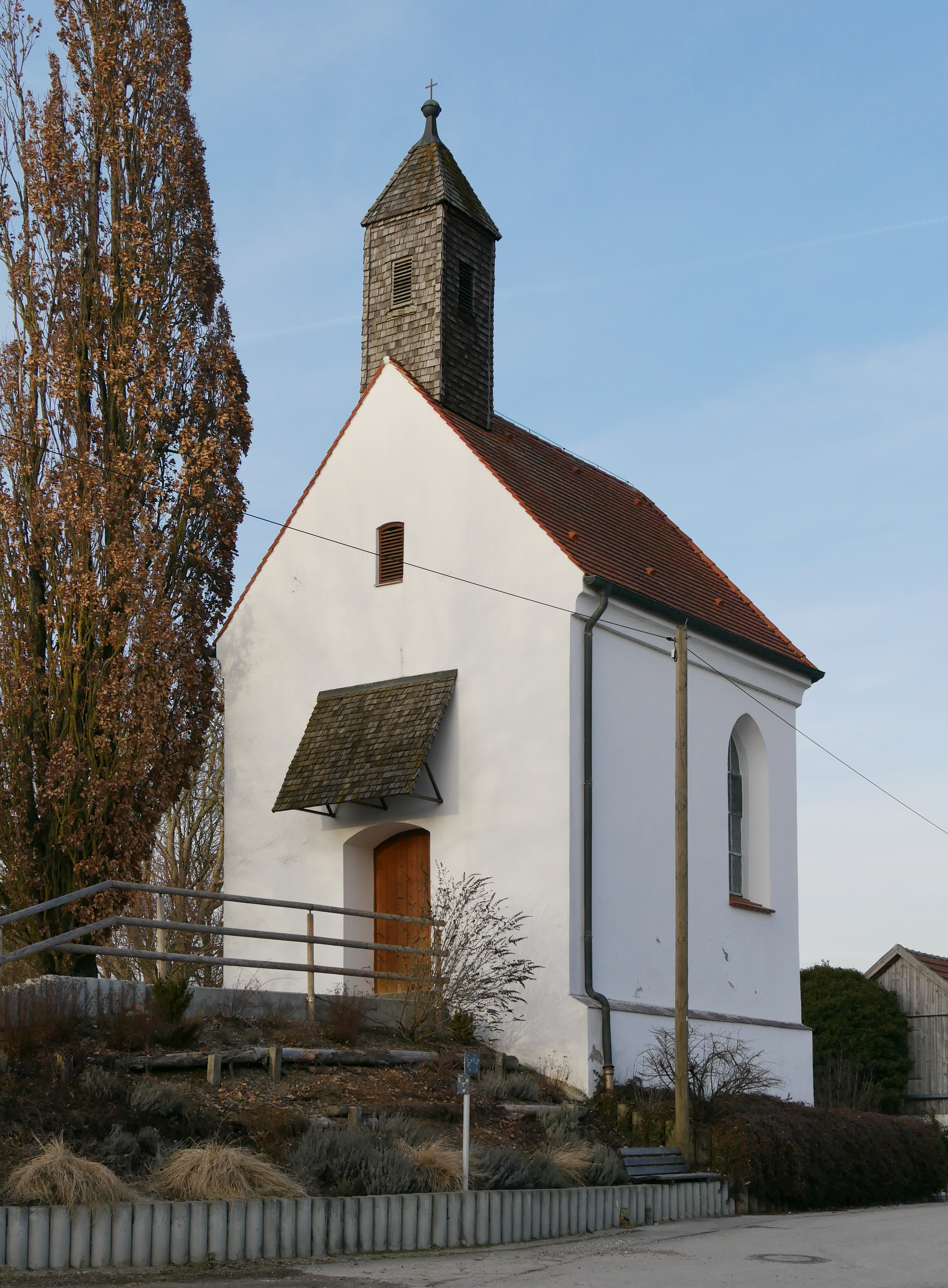 Maisach, Ortsteil Diepoldshofen, Diepoldshofen 5: Katholische Kapelle St. Leonhard. Ansicht von SSW